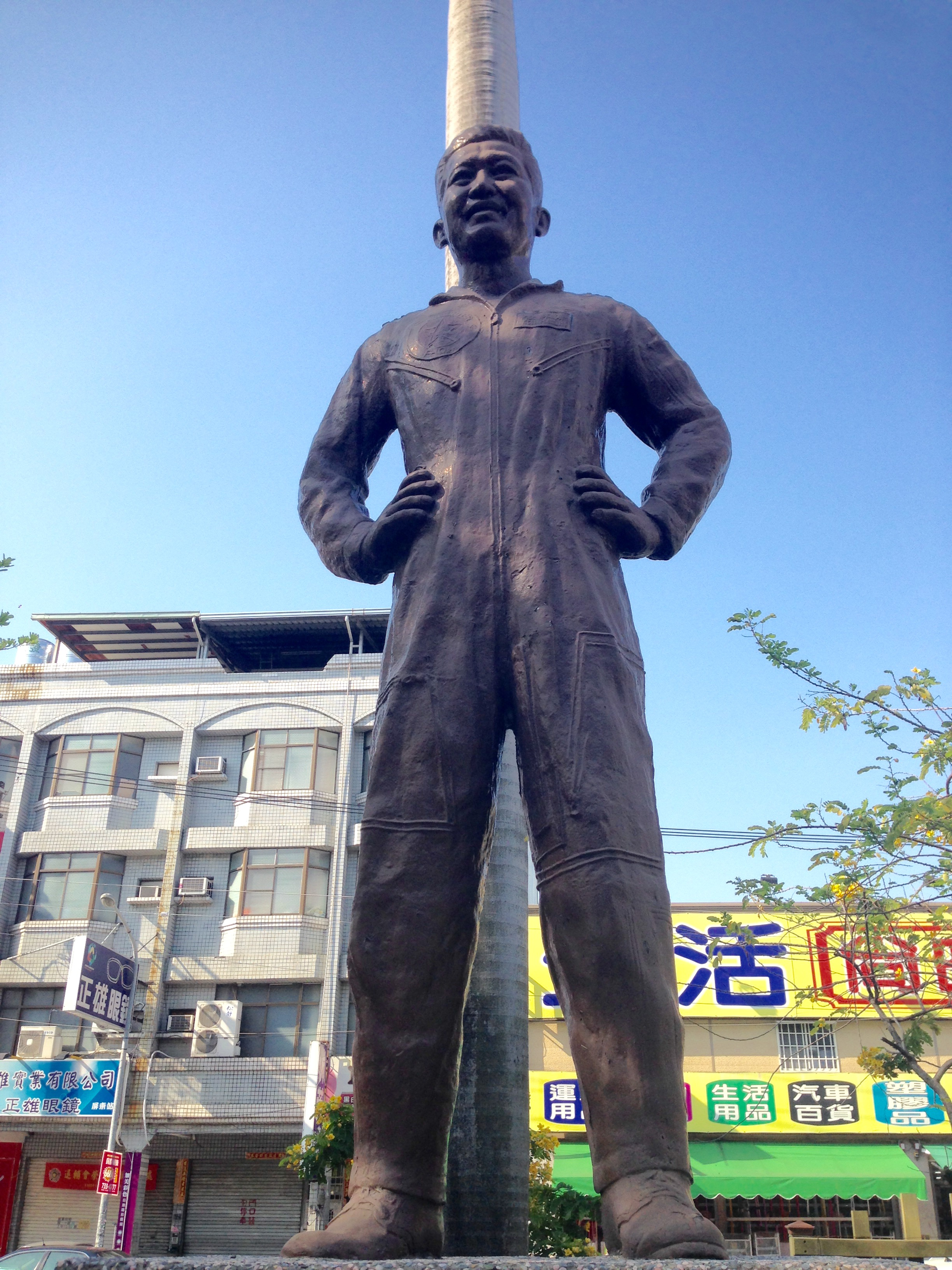 中文（台灣）: 林鶴聲銅像